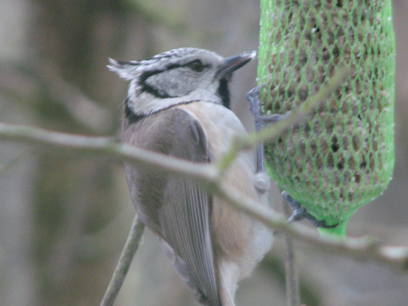 Haubenmeise in Niederaula